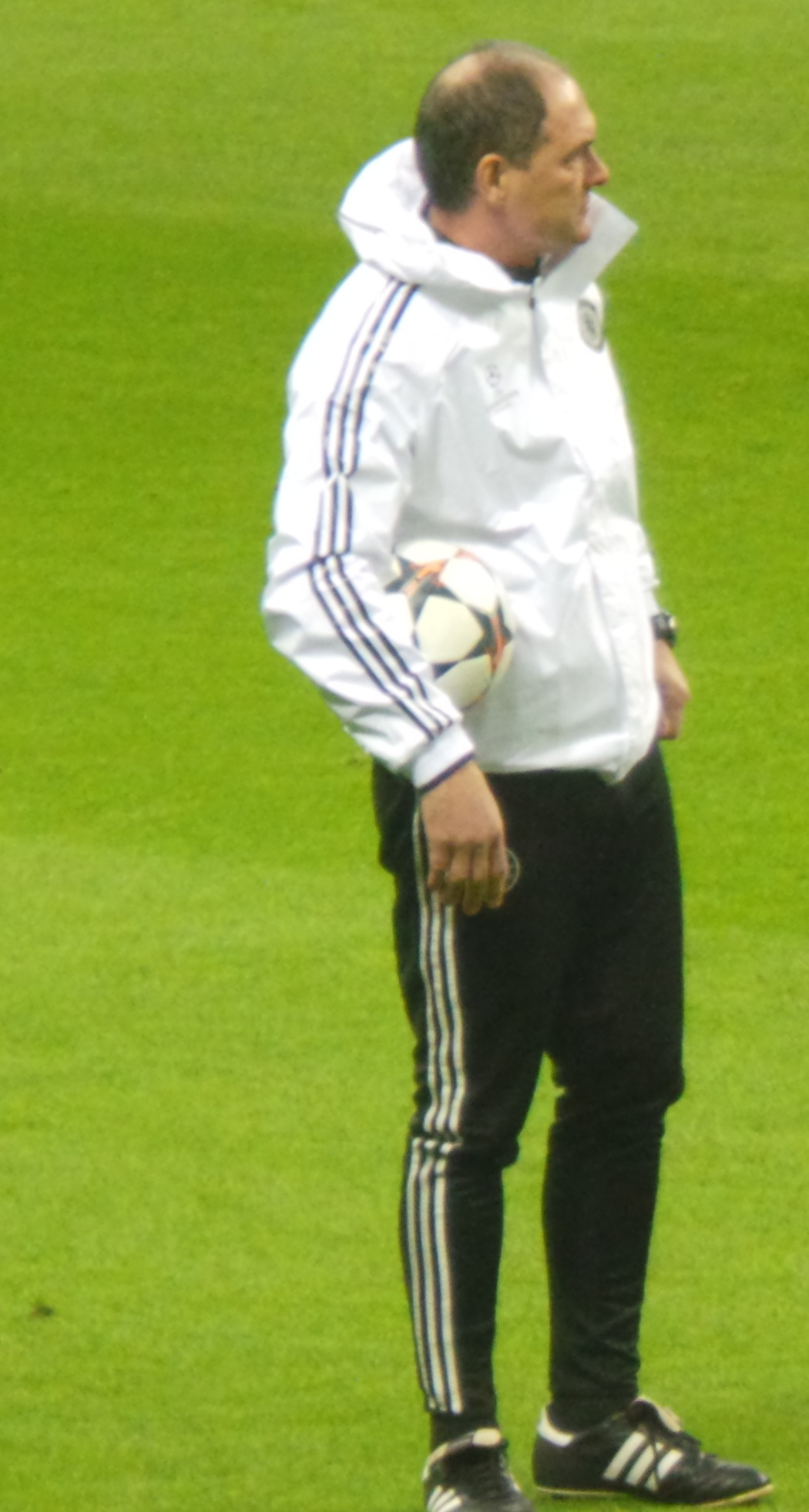 Silvino Louro